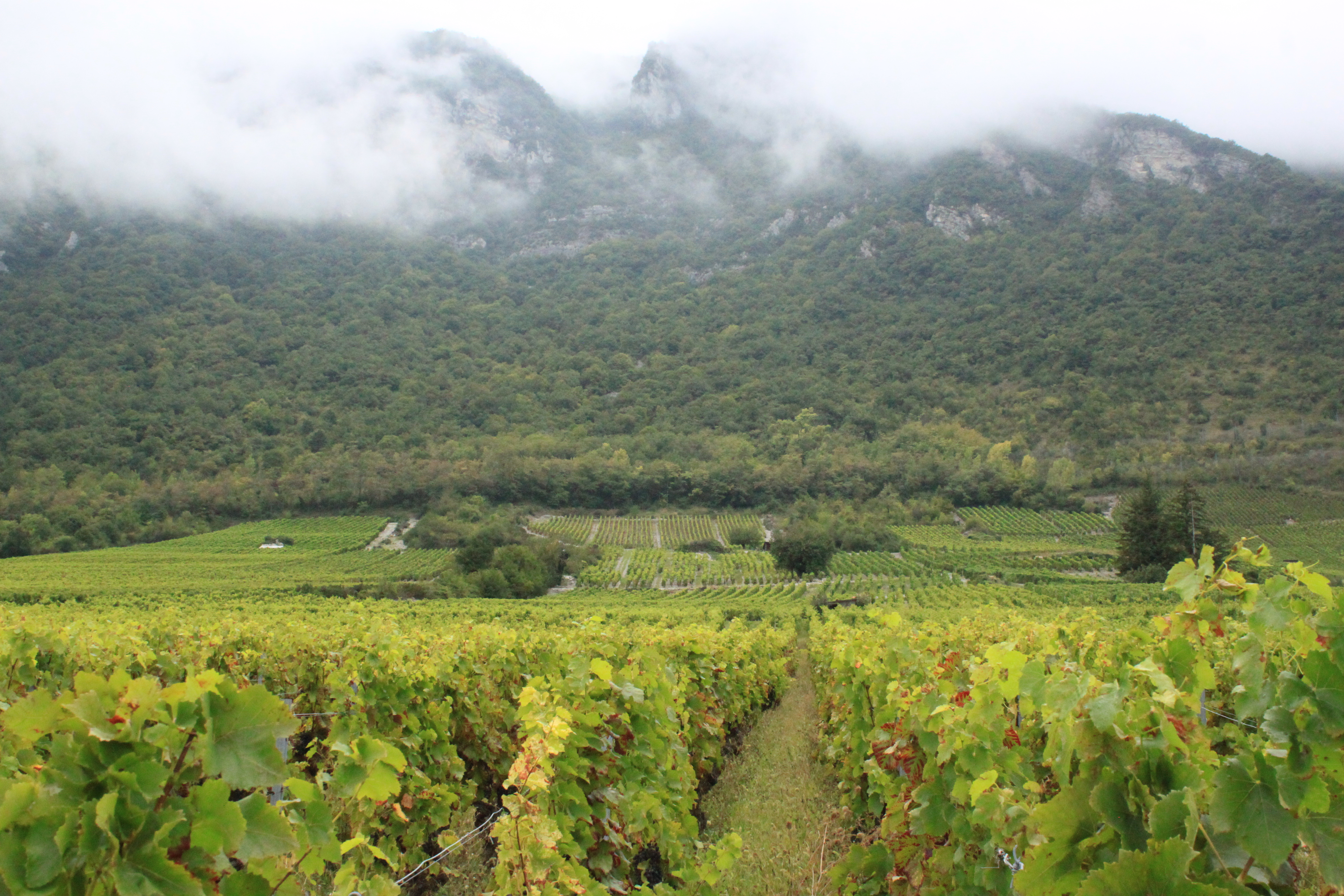 Vignoble, Fr-73-Arbin.